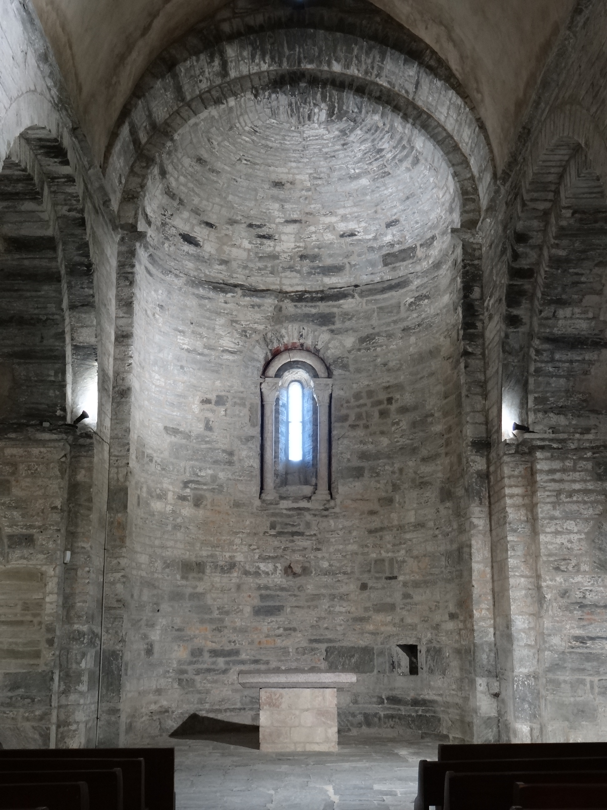 Prieuré de Serrabona - Abside